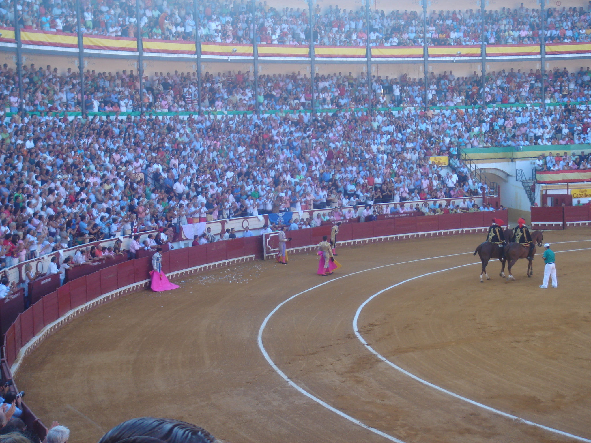 Corrida de toros en El Puerto de Santa María del día 12 de Agosto de 2007, la plaza casi se llenó, esto es una pequeña muestra de los tendidos.